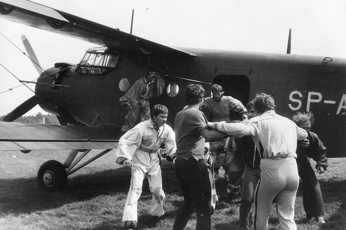 An-2TD SP-ANG. Trening naziemny do powietrznej formacji. Od lewej skoczek z Prievidzy Czechosłowacja, Stanisław Gruszka Aeroklub Śląski, Witold Lewandowski Sekcja Spadochronowa Aeroklubu Gliwickiego, Krzysztof Filus Aeroklub Śląski, Andrzej Tomkowicz Aeroklub Rybnickiego Okręgu Węglowego, tyłem Kazimierz Szymura z Aeroklub Rybnickiego Okręgu Węglowego (zginął podczas skoku w 1987 roku) i Andrzej Młyński „Młynek“ Sekcja Spadochronowa Aeroklubu Gliwickiego